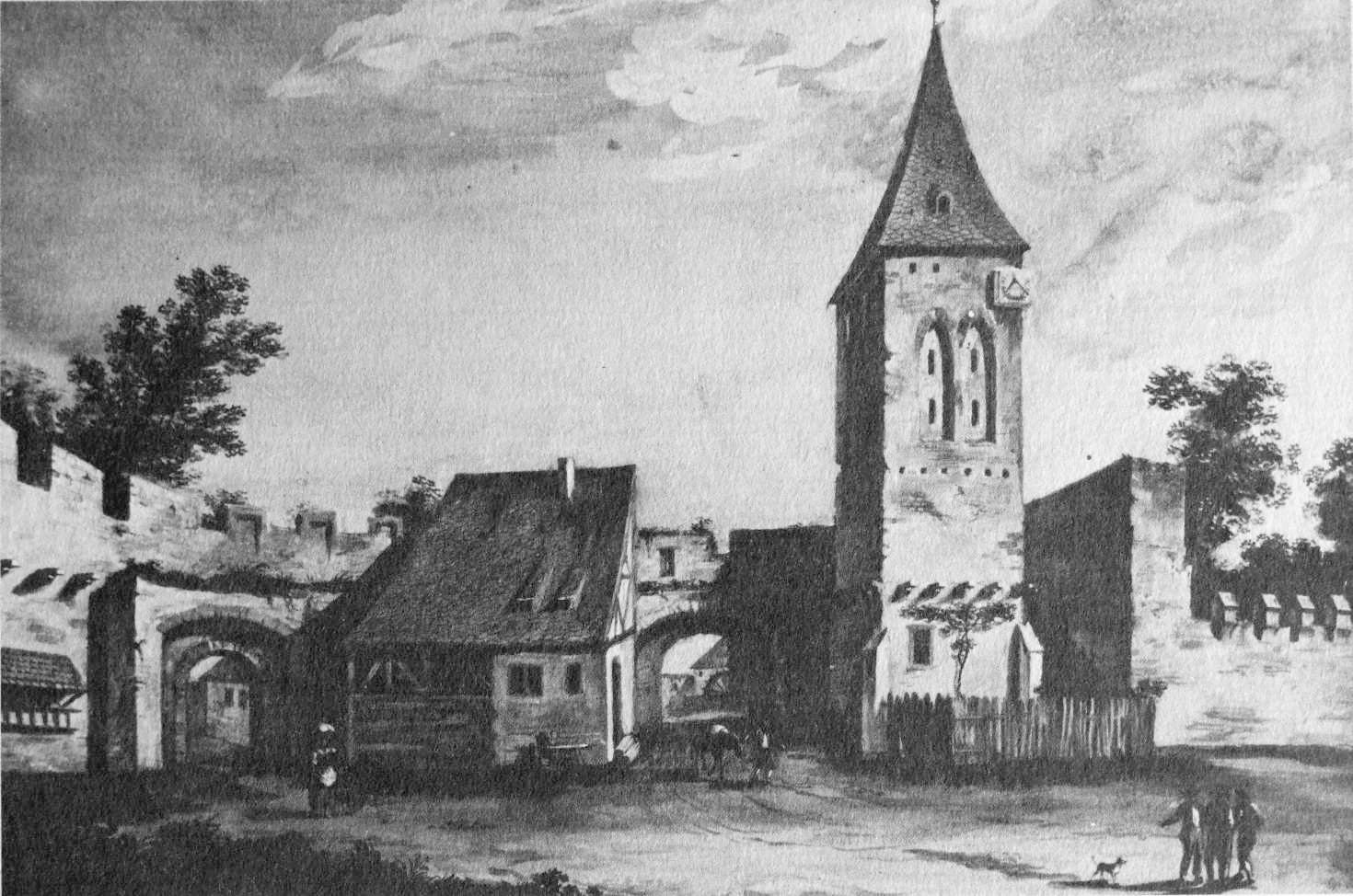 Mittelalterliche Stadtbefestigung von Speyer am westlichen Fischmarkt von Süden. Von links: Lauertor, Salztor und Salzturm. Im Durchblick des Salztores ist eine Wassermühle am Speyerbach zu erkennen